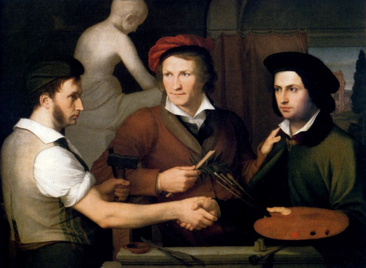 Фридрих Вильгельм фон Шадов (нем. Friedrich Wilhelm von Schadow; 6 сентября 1788, Берлин — 19 марта 1862, Дюссельдорф) — немецкий художник. ================= Friedrich Wilhelm von Schadow (7 September 1789 – 19 March 1862) was a German Romantic painter.